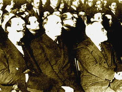 ALFREDO PALACIOS, NICOLÁS REPETTO Y LISANDRO DE LA TORRE (años 1930)